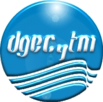 Direccion General de Educacion en Ciencia y Tecnologia del Mar